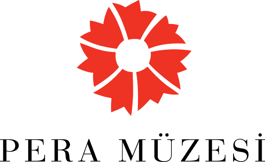 Pera Müzesi'nin resmî logosu.